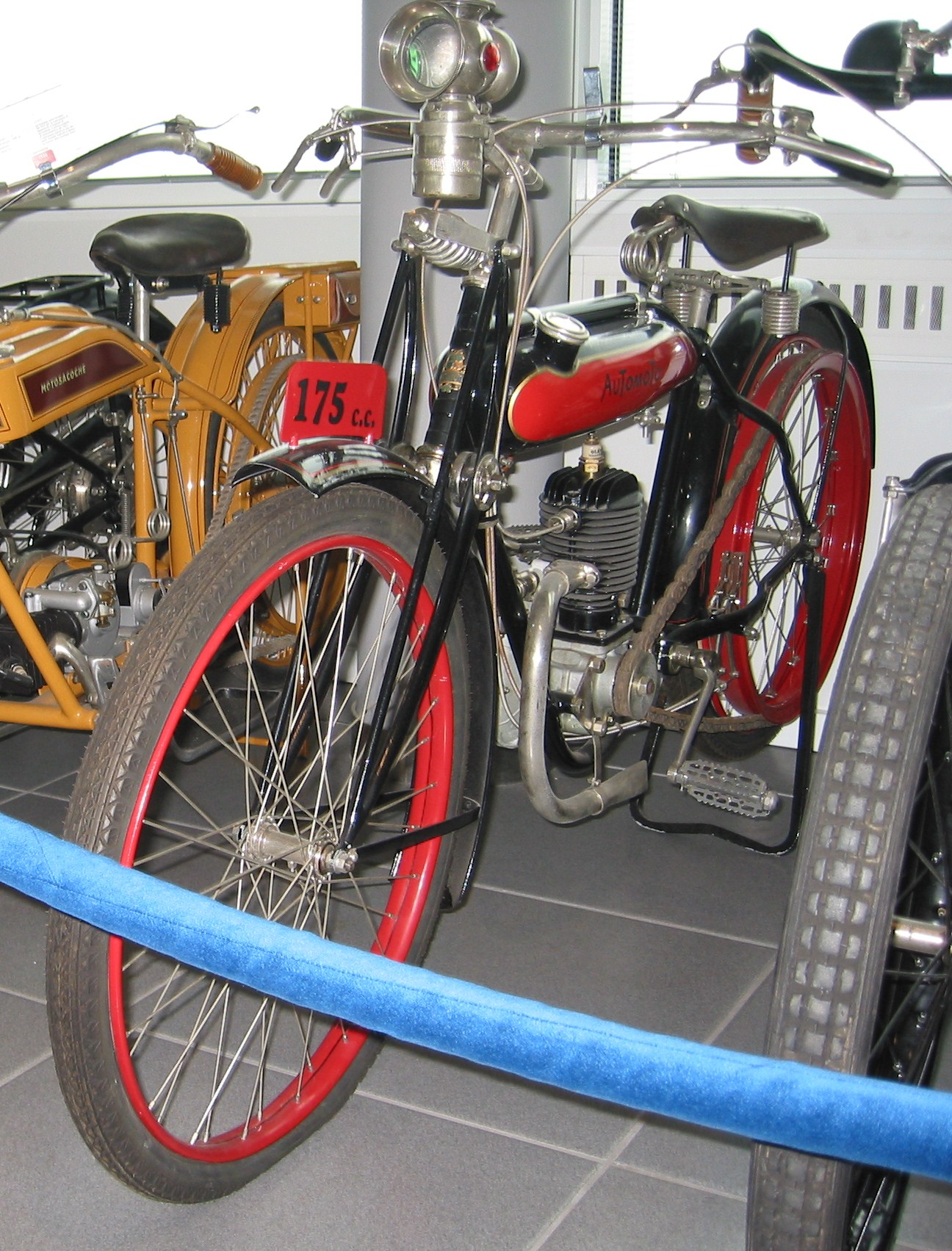 Automoto